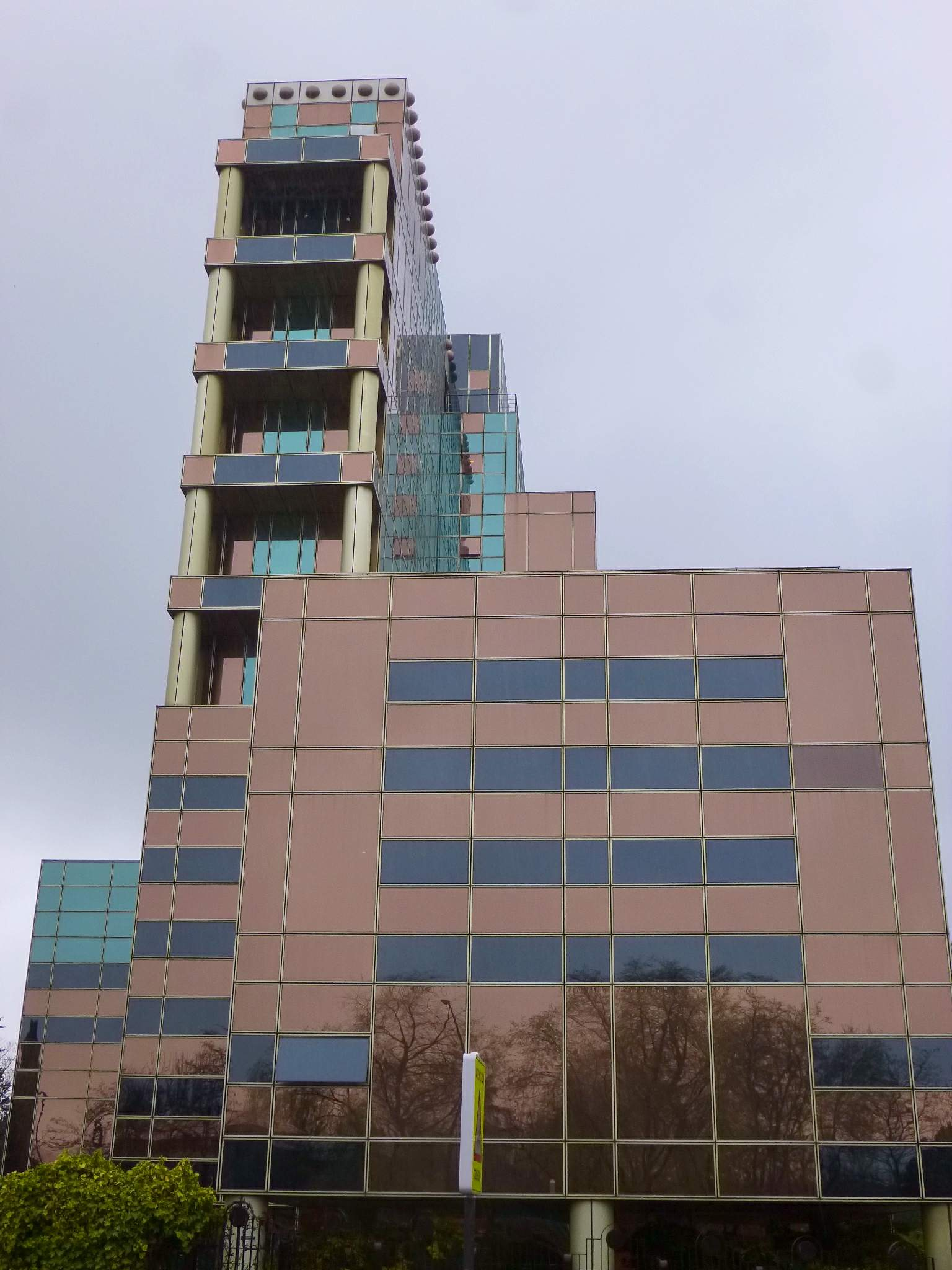 Sede del diario La Razón en Madrid, entre las calles Telémaco y Josefa Valcárcel (barrio de Salvador, distrito de San Blas-Canillejas)